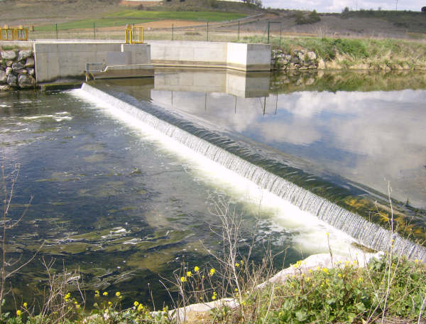 Presa en el Arroyo Ahogaborricos en San Román del Valle (Villabrázaro, Zamora, España)